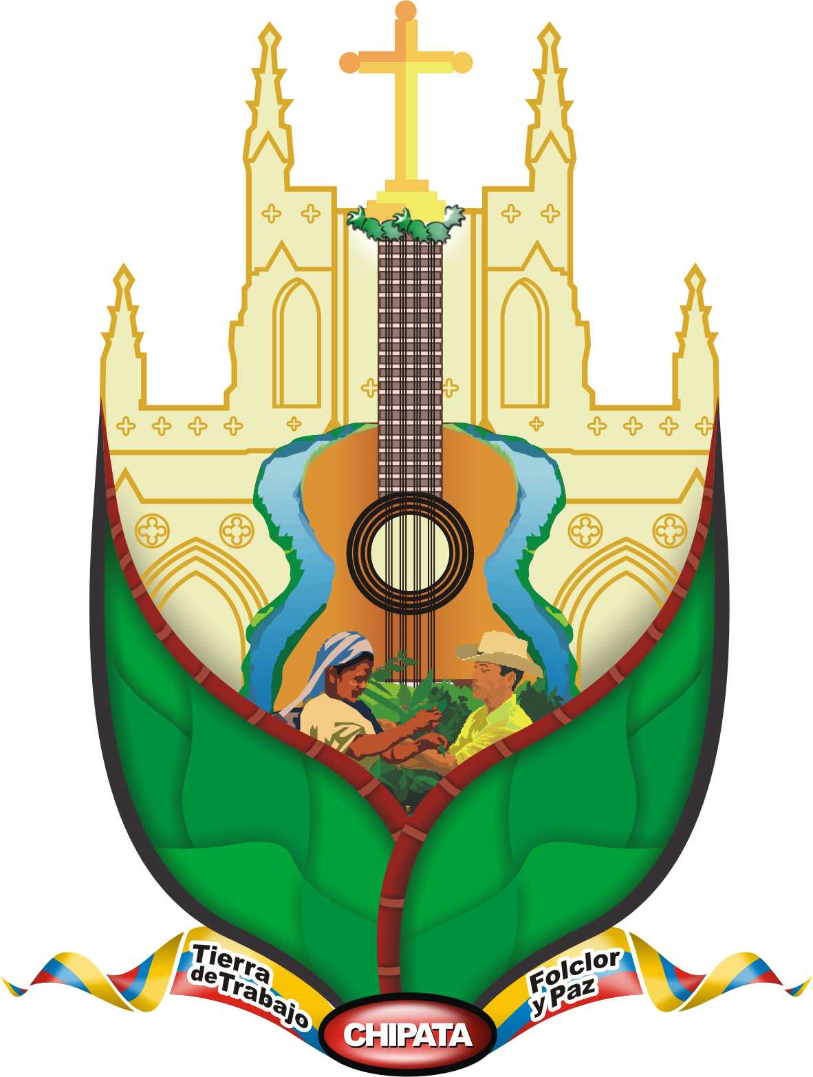 El Escudo de Chipatá Santander